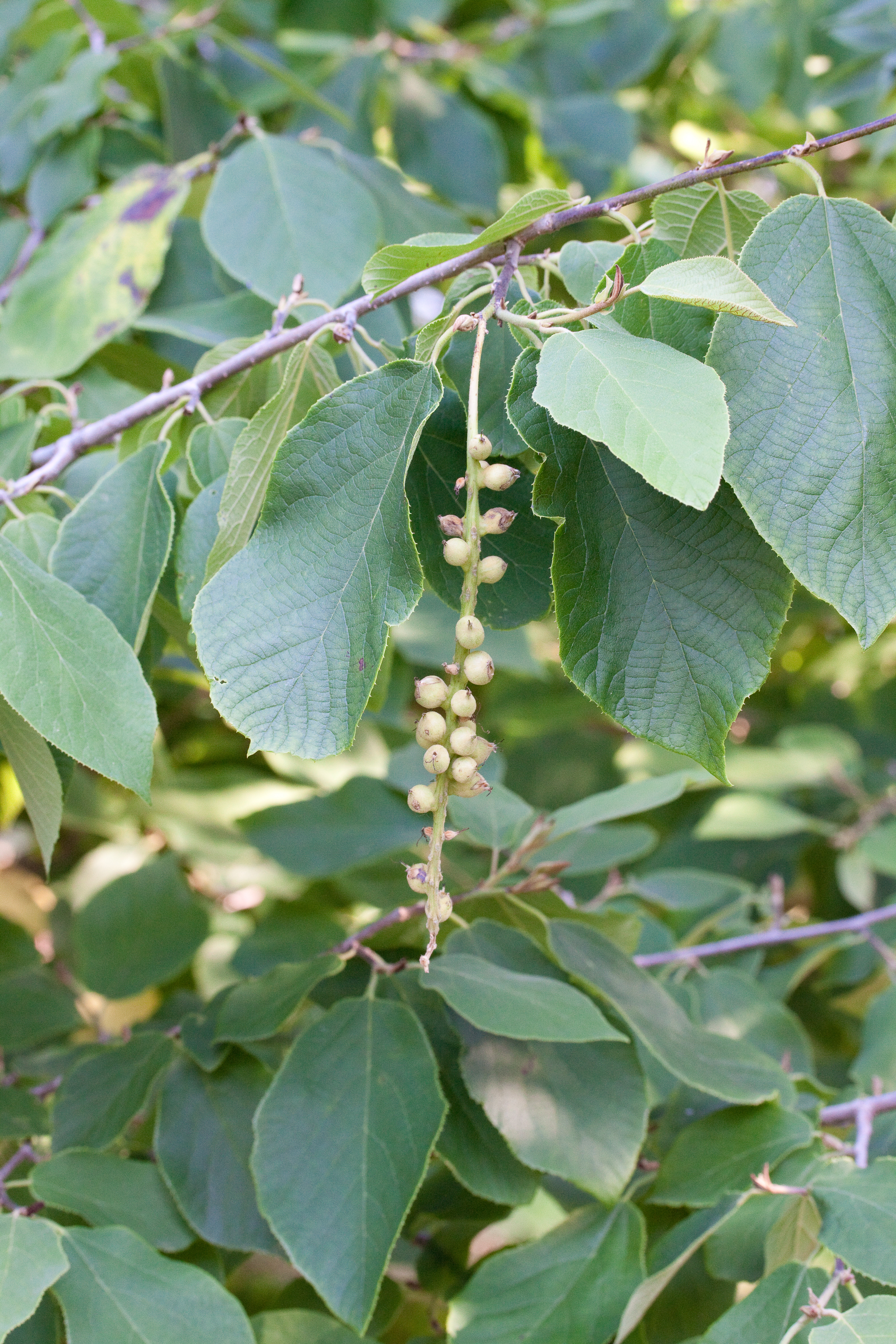 Jeunes fruits de Sinowilsonia henryi - Jardin botanique de Strasbourg - France